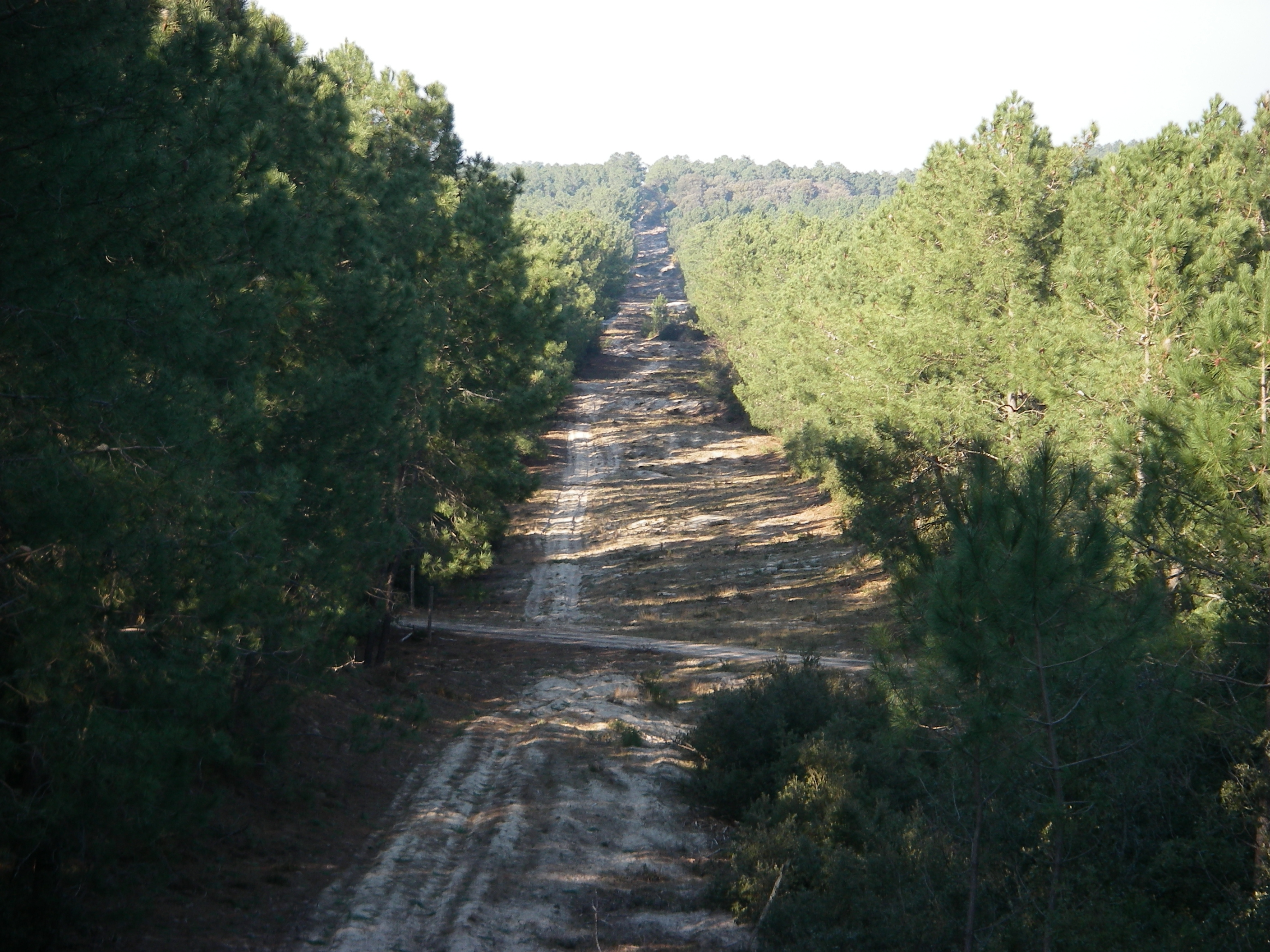 Une parefeu dans la forêt des Landes (Hourtin, Gironde, Aquitaine, France)